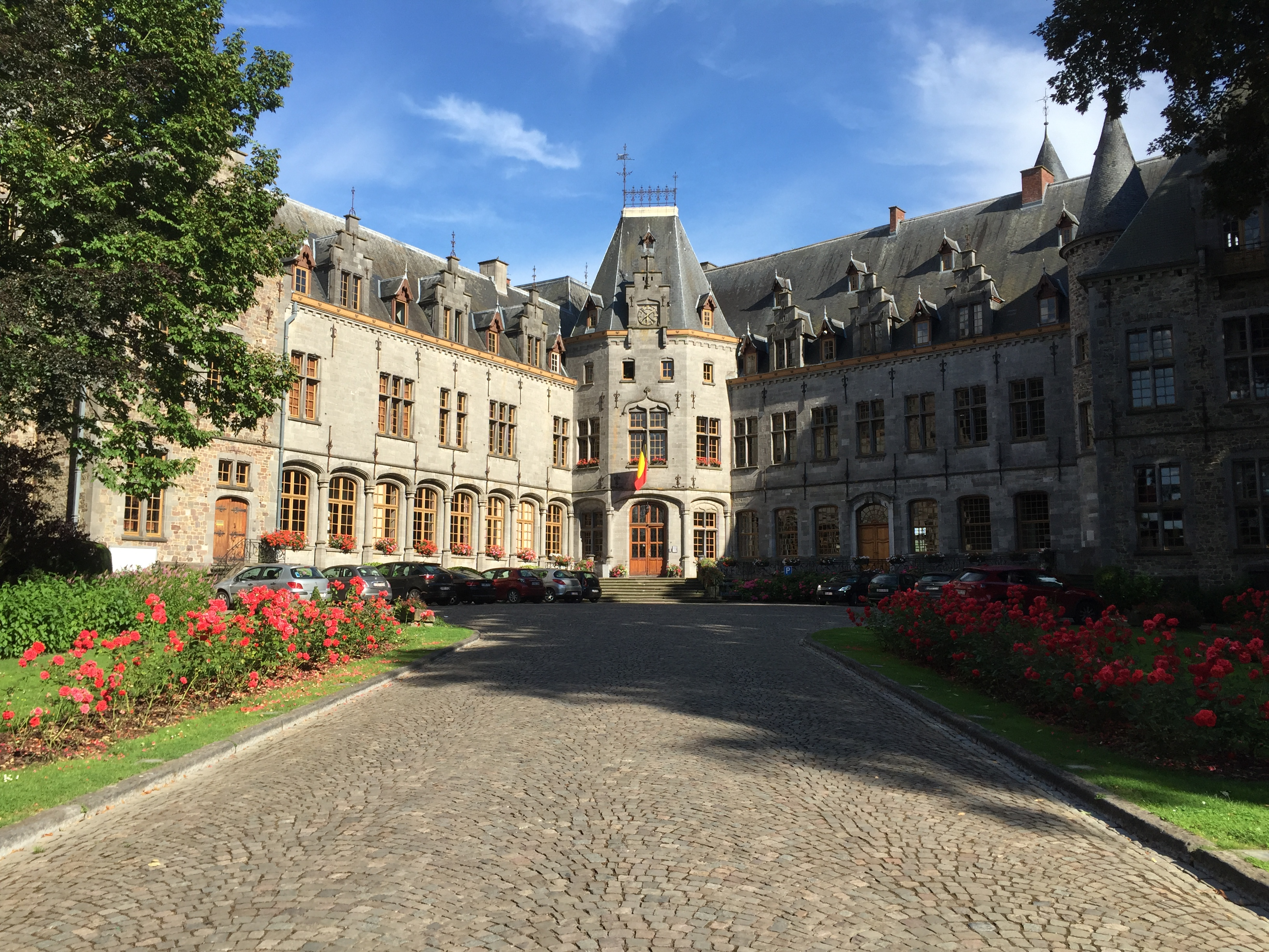 Château de Ham-sur-Heure - Actuellement l'administration communale